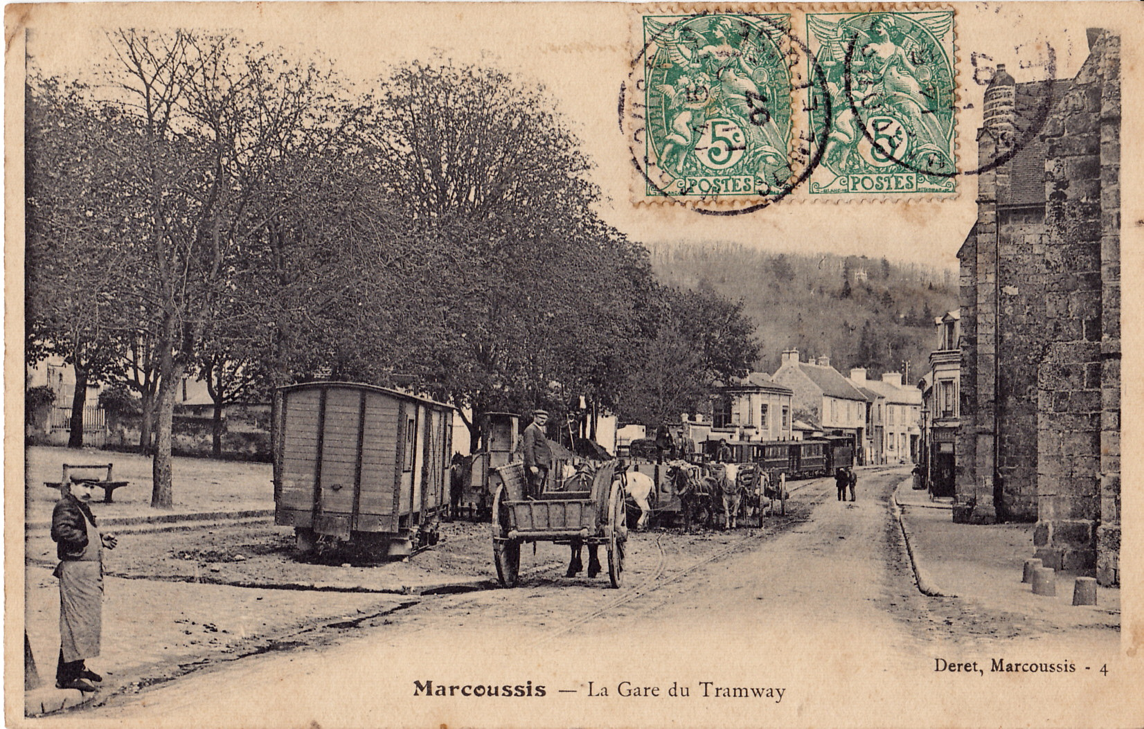 Carte postale ancienne éditée par Deret à Marcoussis : MARCOUSSIS - La Gare du Tramway